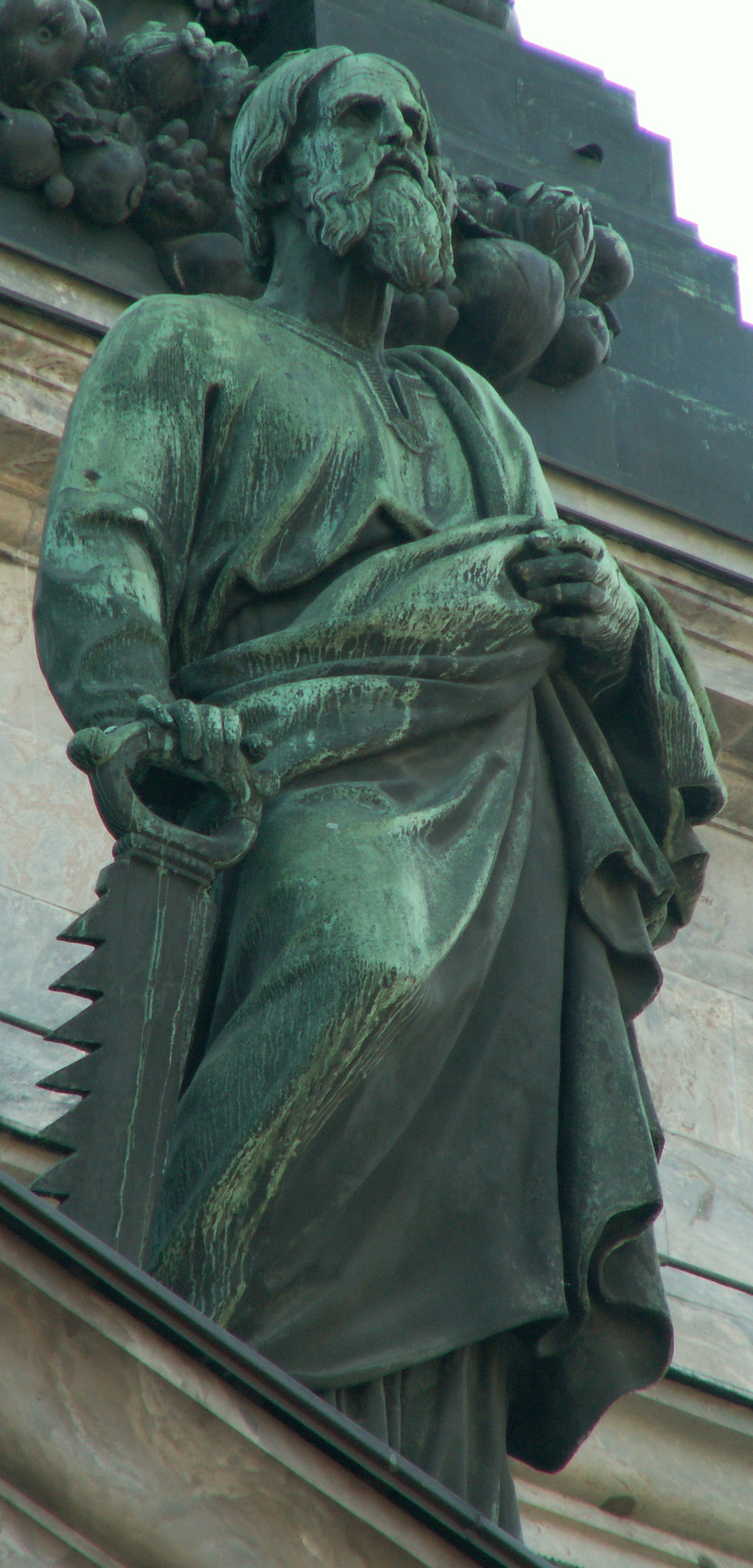 Statue of Apostle Simeon on Saint Isaac's cathedral. Saint Petersburg, Russia Статуя Апостола Симона на Исаакиевском соборе. Санкт-Петербург. Россия.